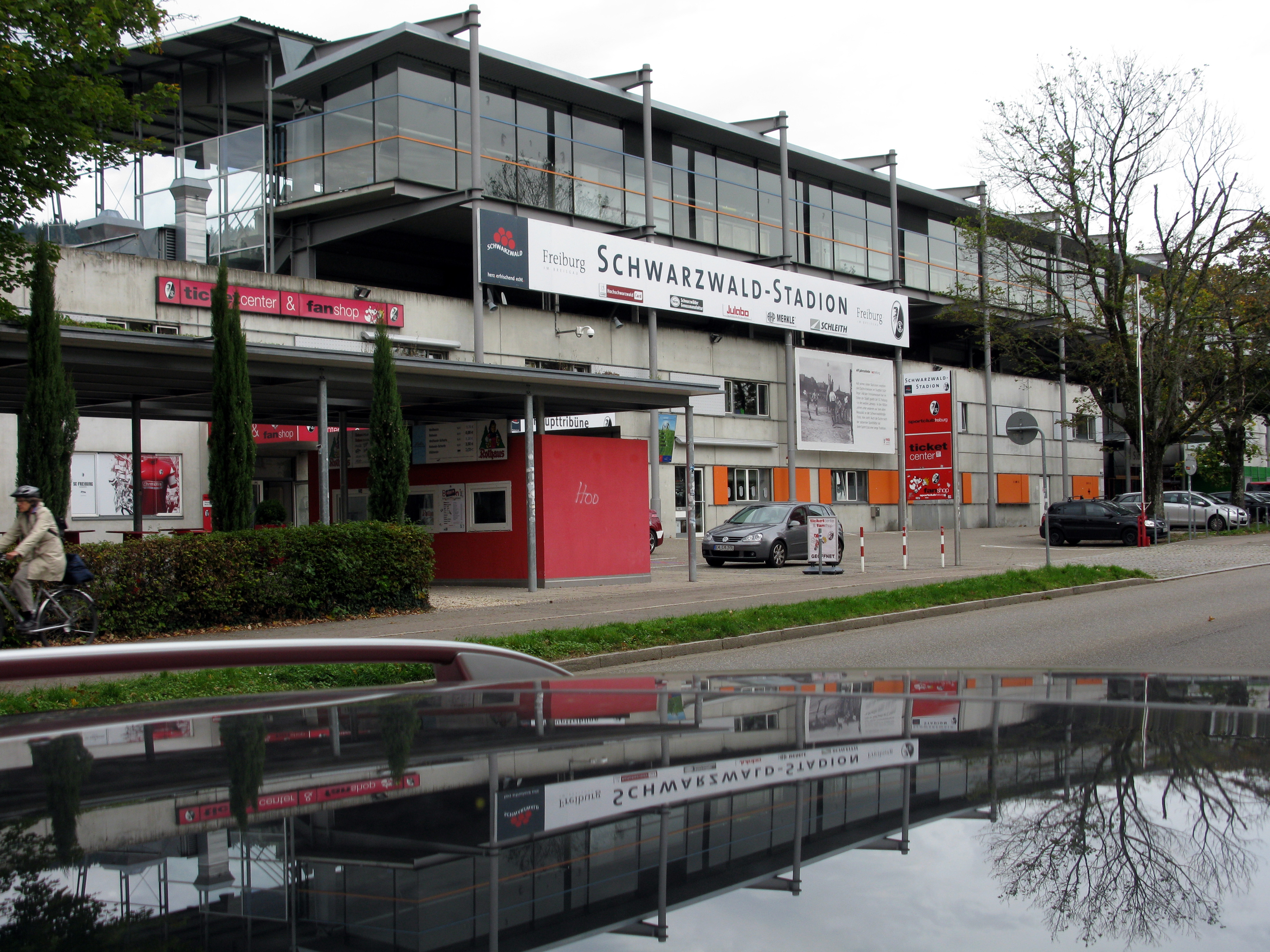 Das SC-Stadion an der Schwarzwaldstraße in Freiburg, das seit Herbst 2014 Schwarzwald-Stadion heißt